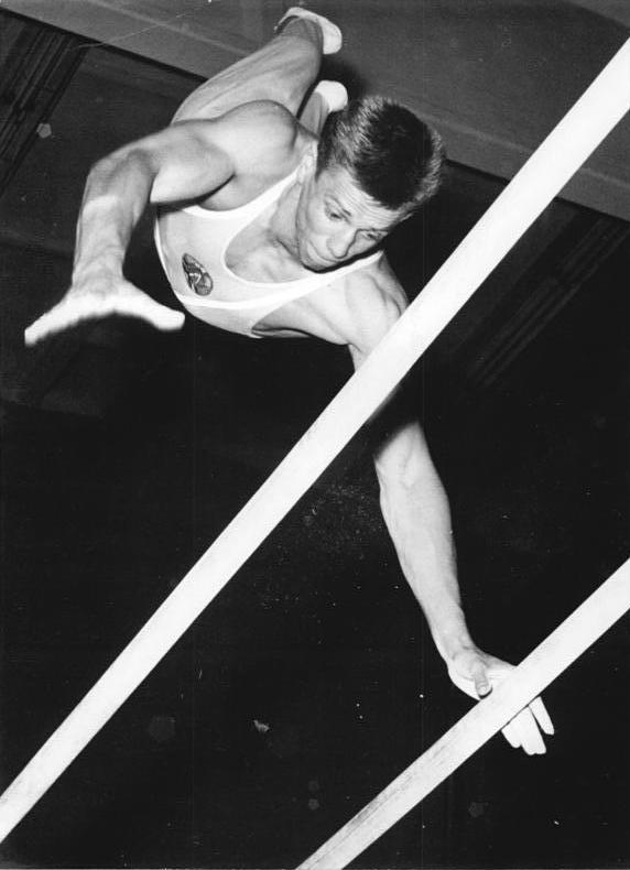 Werner Dölling Zentralbild Kohls Tre-gs. 24.6.62 Turnweltmeisterschaften 1962. Vom 3. bis 8.7.1962 finden in Prag die Turnweltmeisterschaften 1962 statt. Das DDR-Aufgebot der Männer umfasst 8 Turner. UBz: Werner Dölling (ASK Vorwärts Berlin) gehört auch zum DDR-Aufgebot. Er trainiert eifrig (hier am Barren) für die Turnweltmeisterschaften 1962.